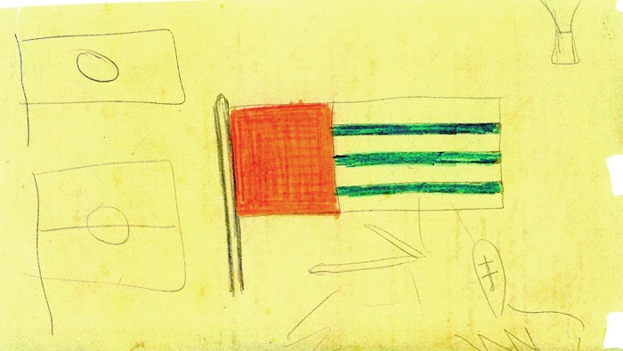 Праект беларускага нацыянальнага сцяга архітэктара Лявона Дубейкаўскага, выкананага ў Петраградзе ўзімку 1916 г. на адвароце анкеты ўцекача з вёскі Трабавічы Наваградскага павета Івана Тумаша. З фондаў НАРБ